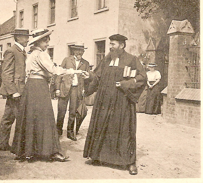 Der Moerser Lehmpastor Emanuel Felke auf der Straße vor der Repelner Linde. Postkarte Verlag Otmar Lade (existiert nicht,mehr), Repelen 1907 gescant Lutz Hartmann, 21.5.2006